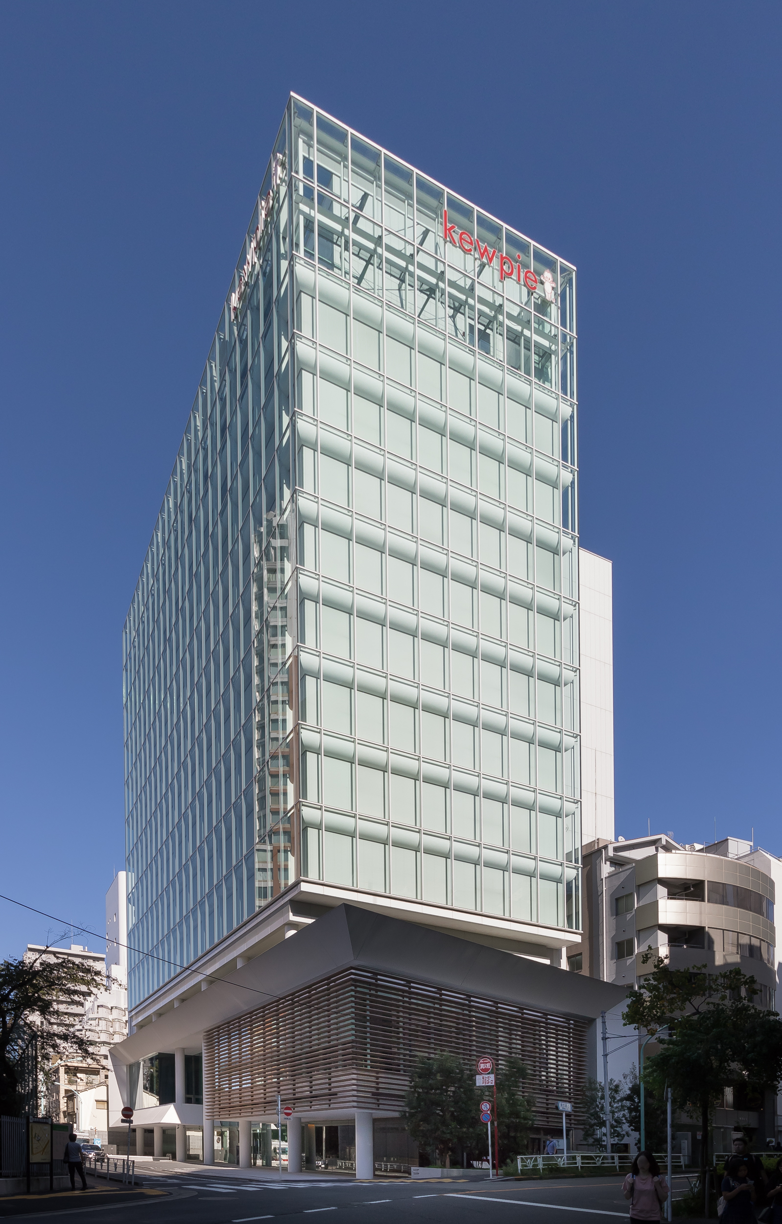 キューピー本社ビル（東京都渋谷区）。